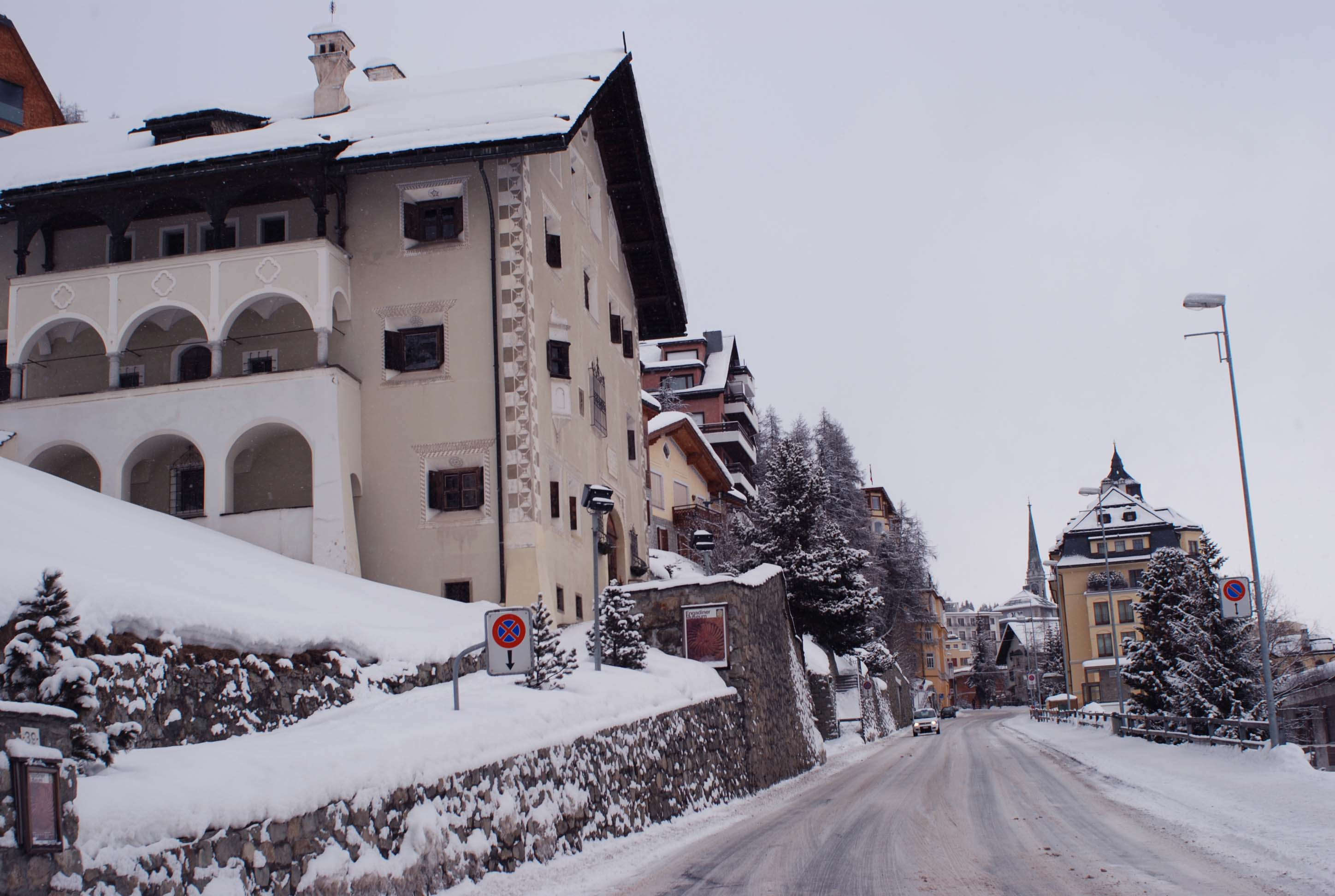 Le Musée de l'Engadine et la route vers le centre de St. Moritz